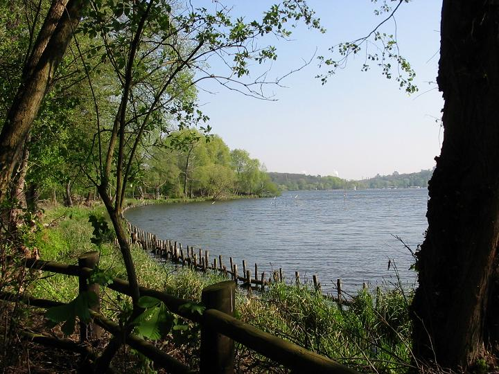 Havel in Berlin, Am Schildhorn, Ostufer an der Jürgenlanke mit Röhrichtschutz